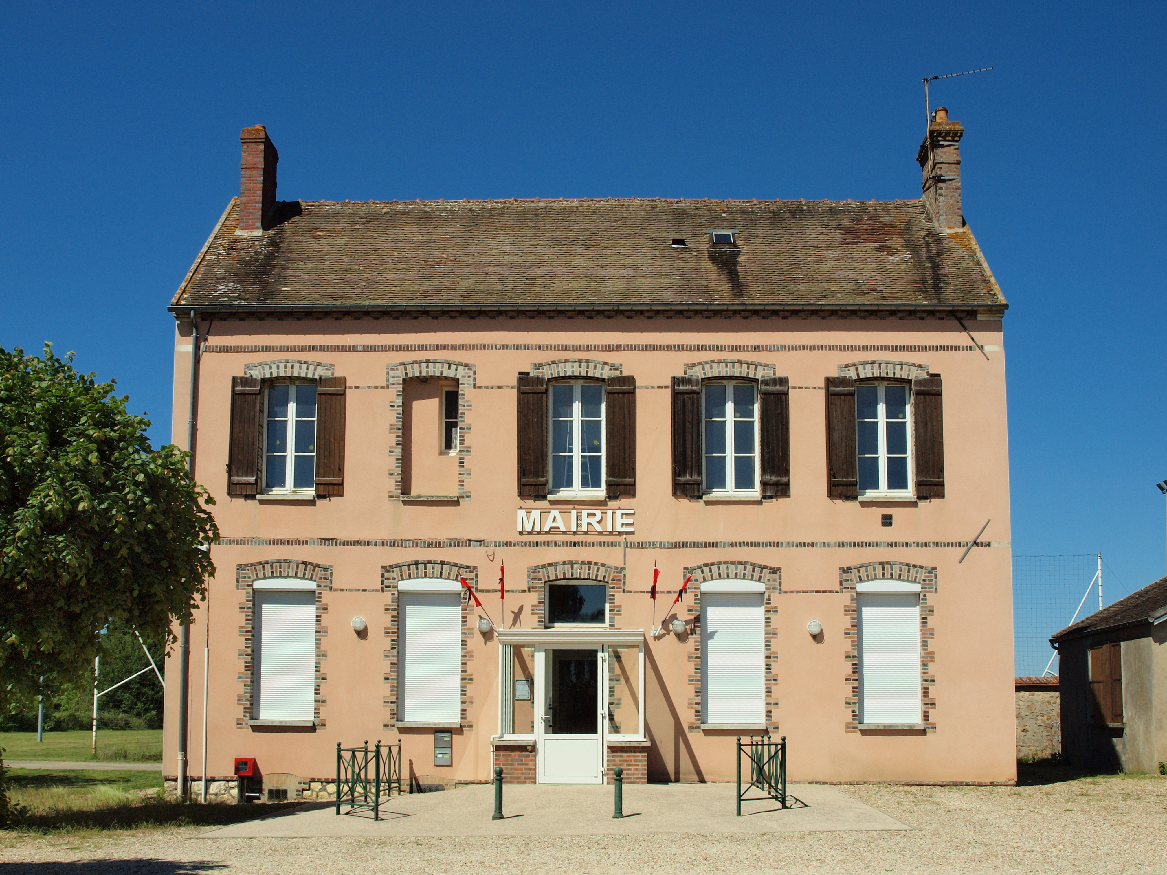 Villeroy (Yonne, France)